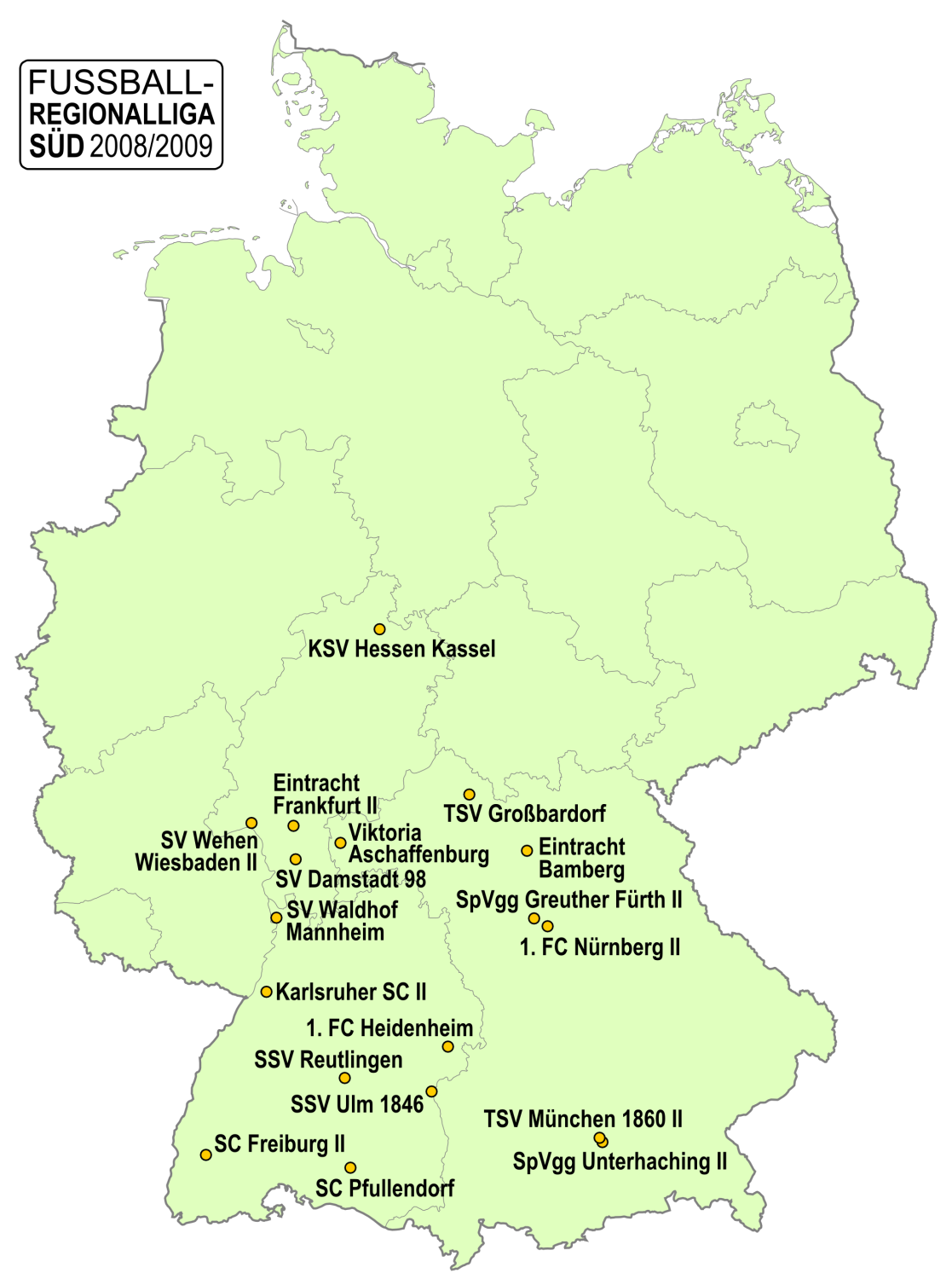 Karte der Vereine der Fußball-Reginalliga Süd, Saison 2008/2009